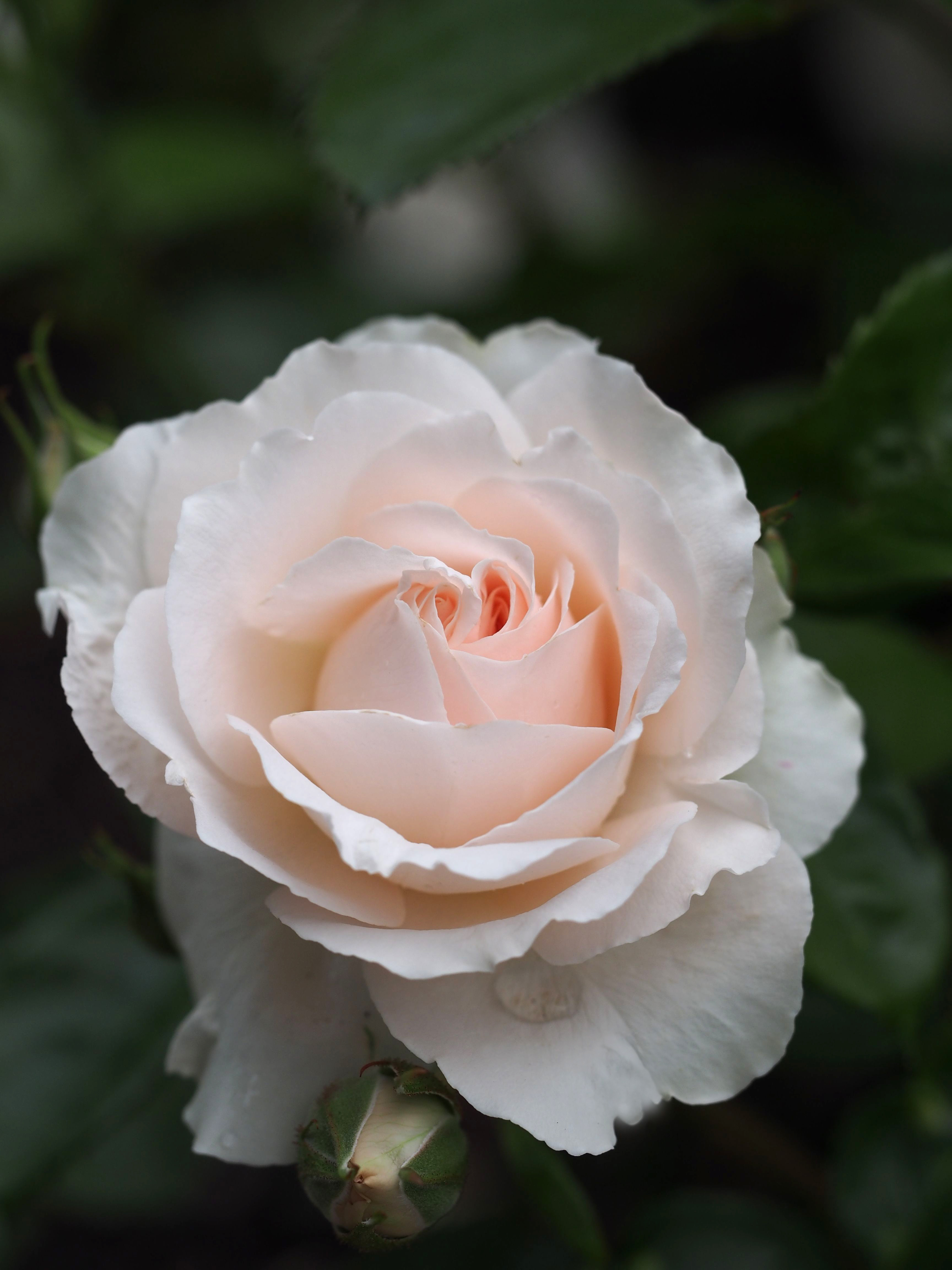 Rose, Miss Dior, バラ, ミス ディオール, Shrub rose シュラブ United Kingdom イギリス Harkness 2012